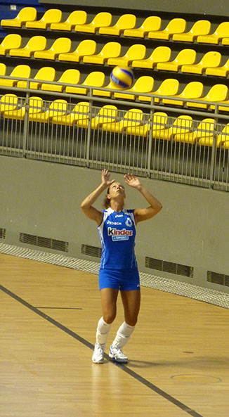 Eleonora Lo Bianco, pallavolista italiana, gioca nel ruolo di palleggiatrice